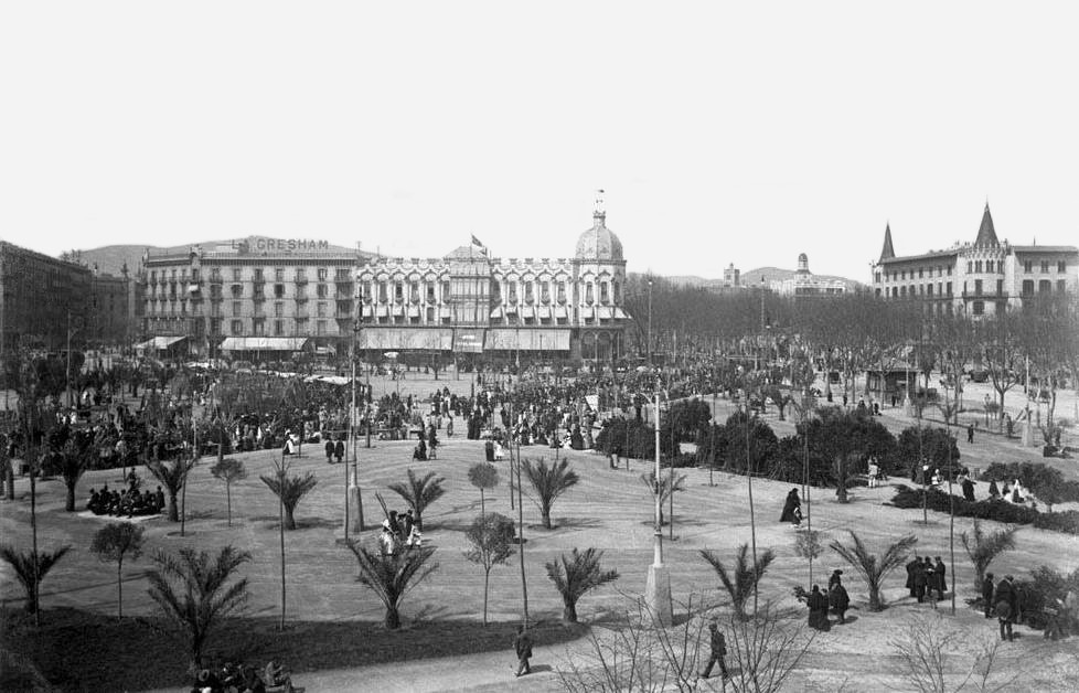 Imatge